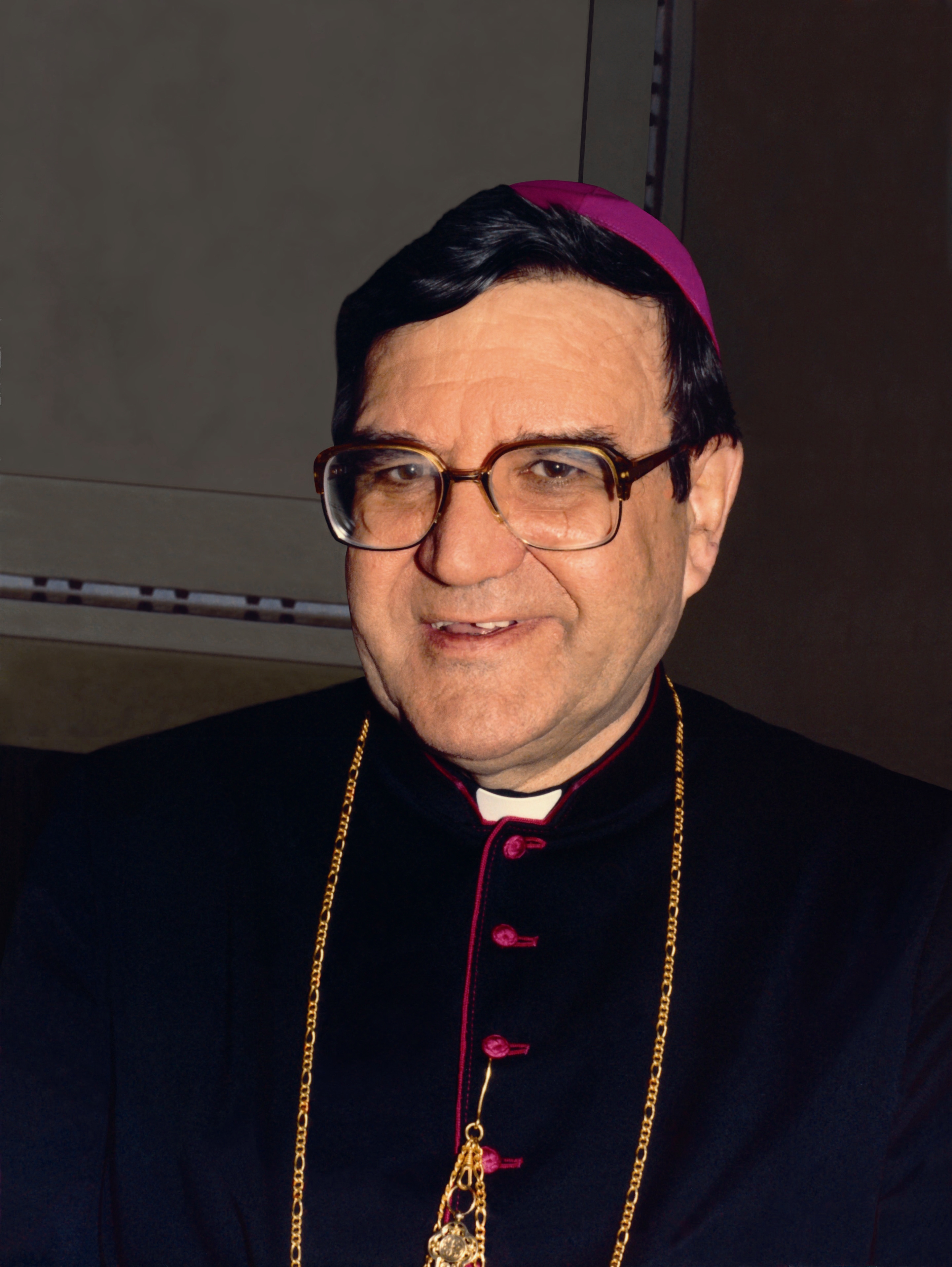 ritratto ufficiale di Antonio Vitale Bommarco